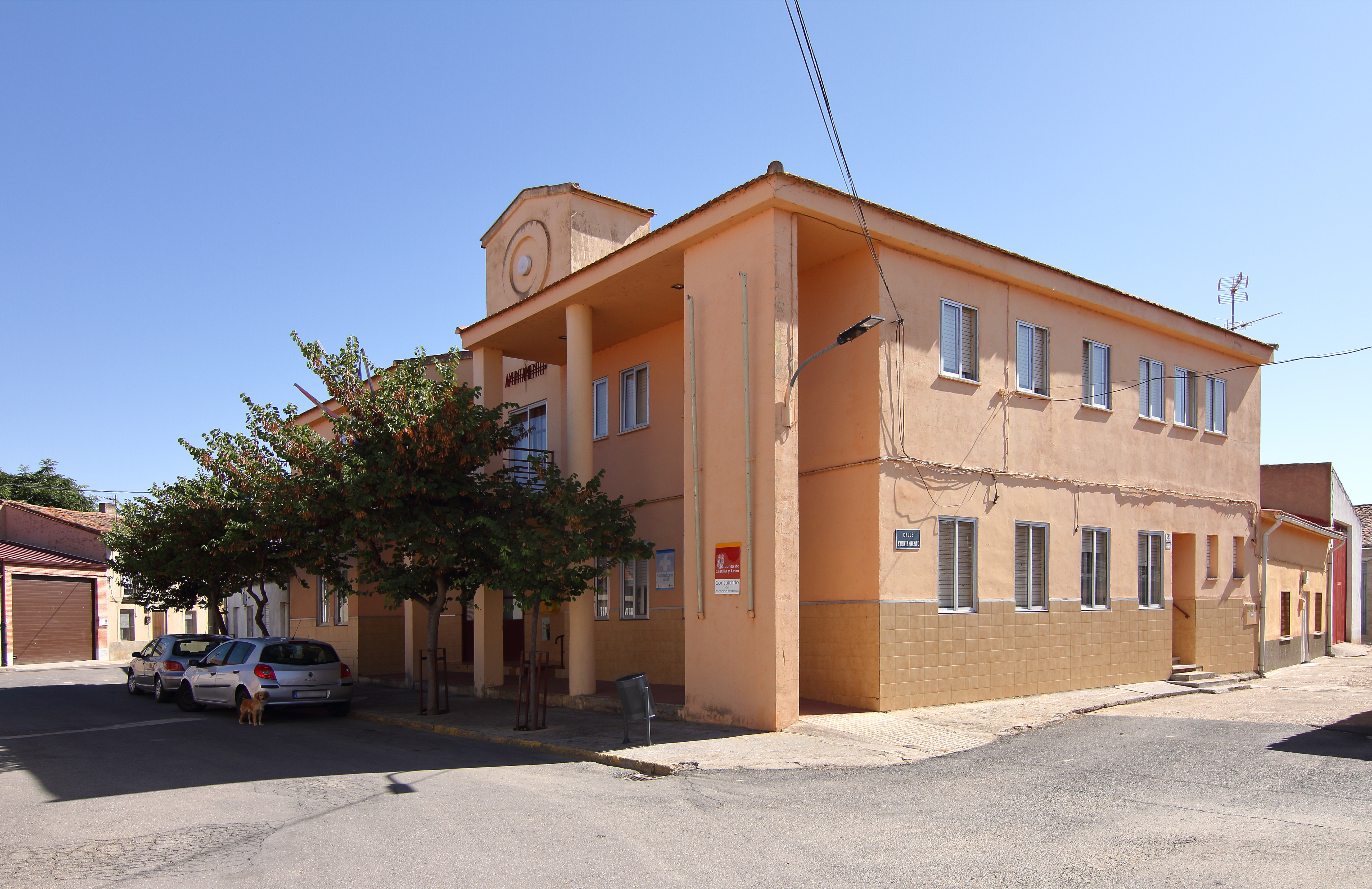 Ayuntamiento de Huerta